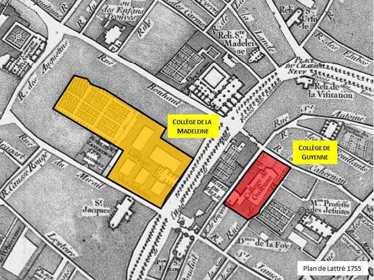 Travail personnel sur un fond du Plan de Lattré de 1755 disponible sur